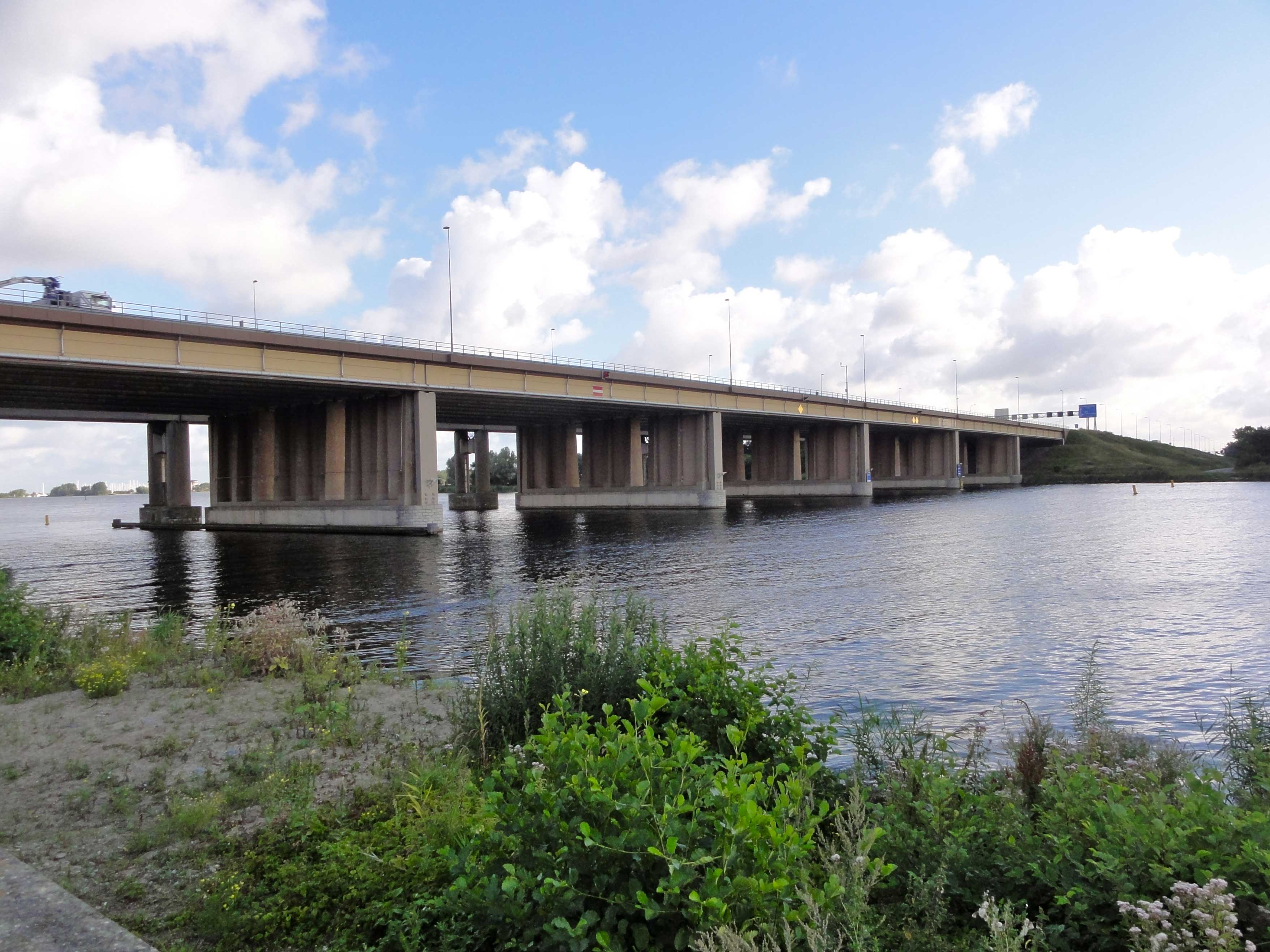 Hollandse Brug tussen Noord-Holland en Flevoland met links het IJmeer en rechts het Gooimeer